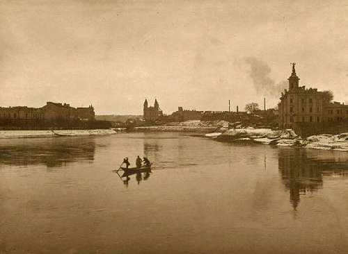 Neris, Vilniaus elektrinė (dešinėje)